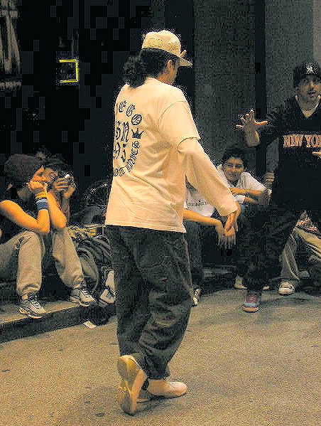 Enfrente de Zara, Gran Vía, Madrid.